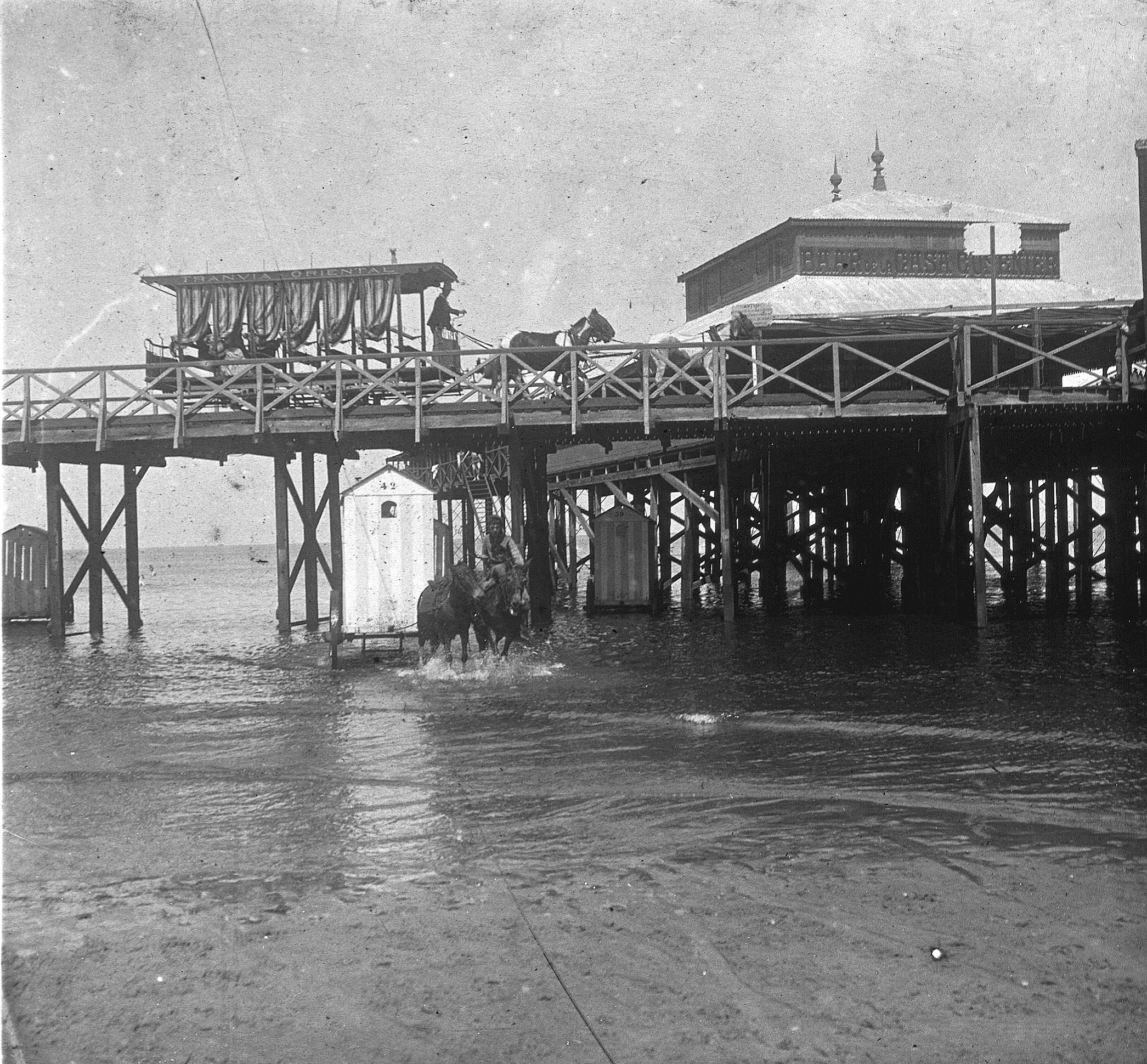 C47f490. Tranvía en la terraza